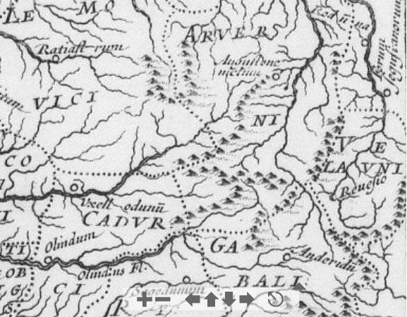 seule carte du XVII présentant Uxellodunum sur la rivière Dordogne Licensing Catégorie:Cartes Histoire de France